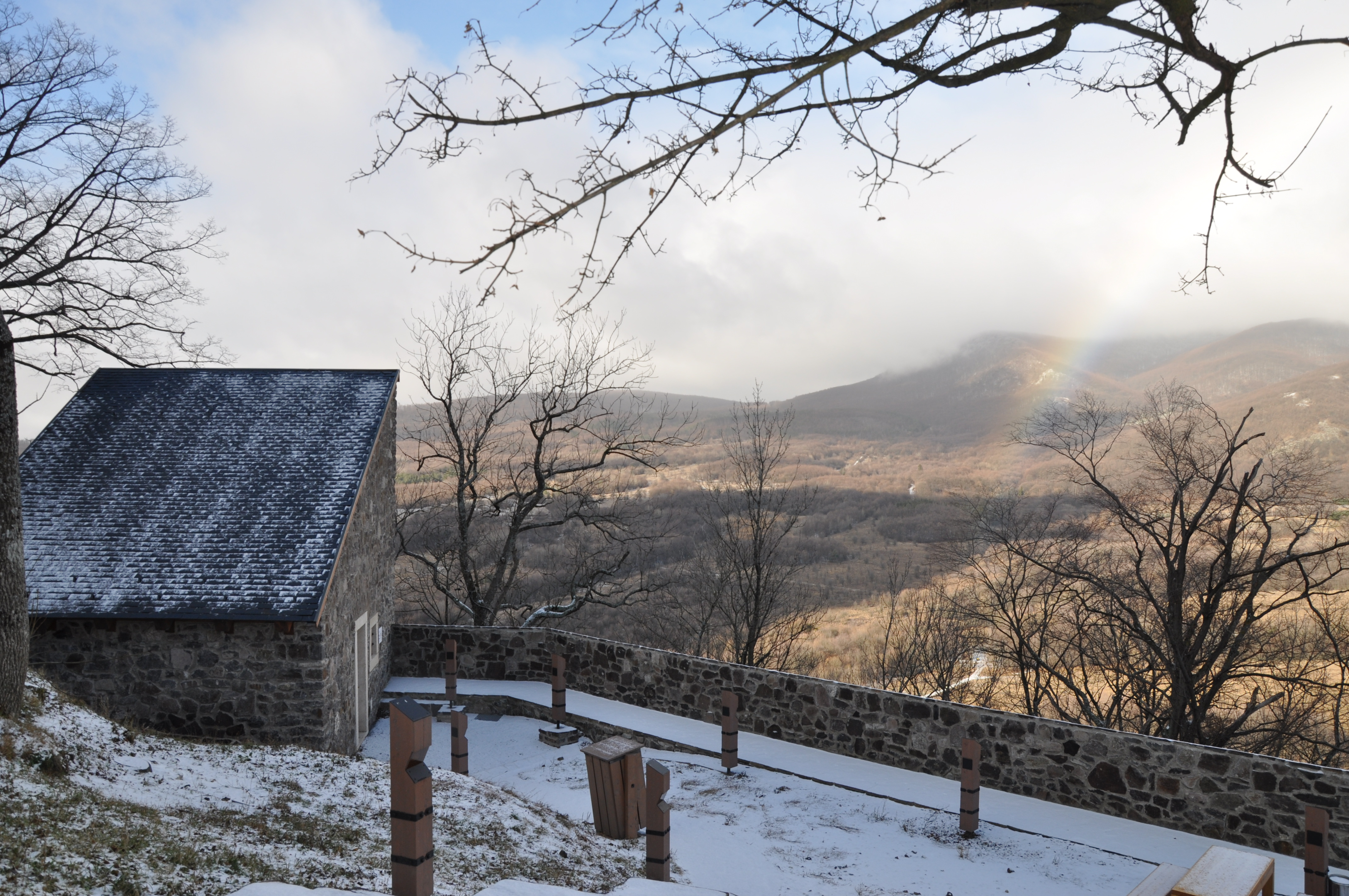 Az újjáépült Füzér vára, gerendás pince